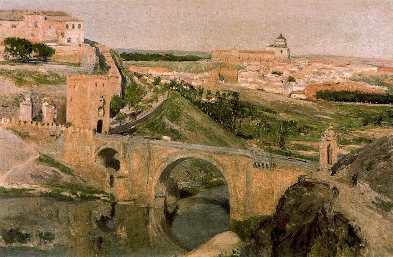 Vista de Toledo1title QS:P1476,es:"Vista de Toledo1" label QS:Les,"Vista de Toledo1"